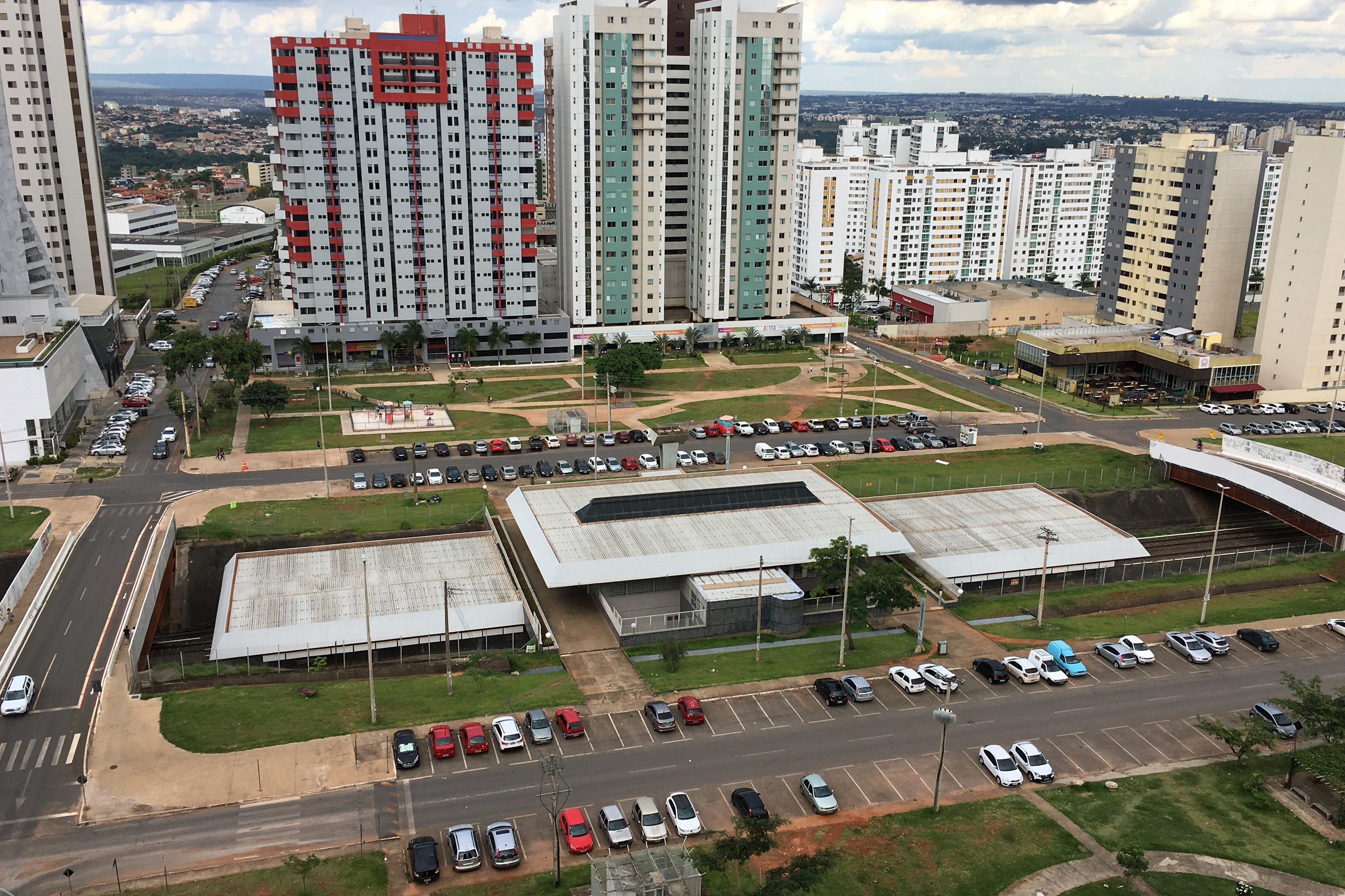 Estação Concessionárias, METRO DF, Aguas Claras, DF, Brasil